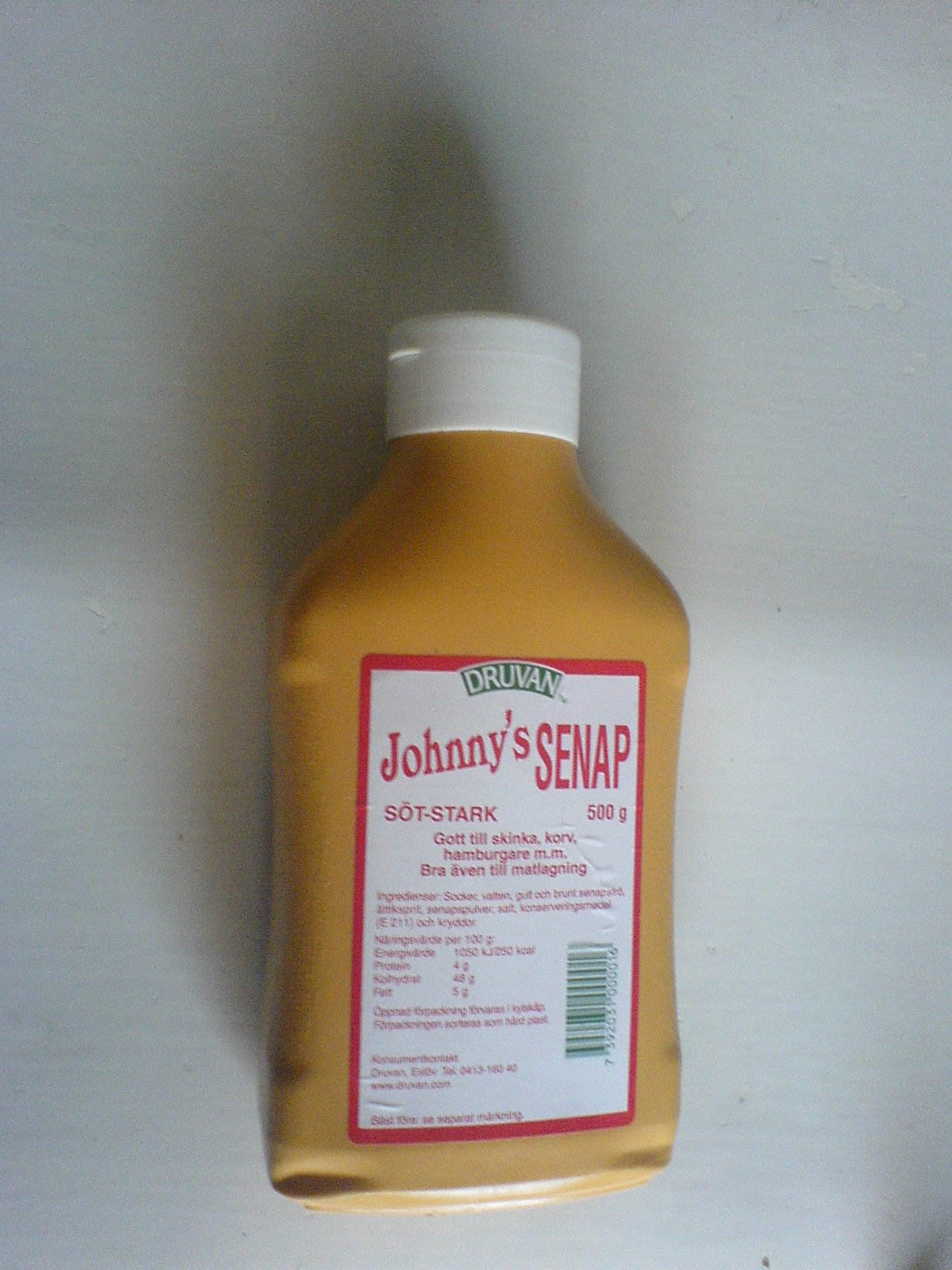 Johnny's sötstarka senap i en 500 grams plastflaska.